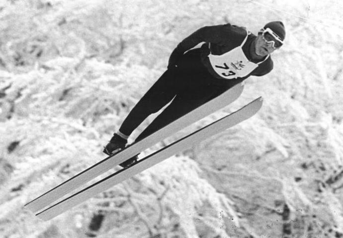 Zentralbild Demme 14.1.1968 Oberhof: Zweite Olympia-Ausscheidung im Spezialsprunglauf - Sieg für Wolfgang Stöhr Die zweite Olympia-Ausscheidung der DDR-Skispringer gewann am 14.1.1968 auf der Schanze am Rennsteig im Kanzlersgrund bei Oberhof Wolfgang Stöhr (SC Dynamo Klingenthal) mit Note 228,5 und Weiten von 105 und 97m.